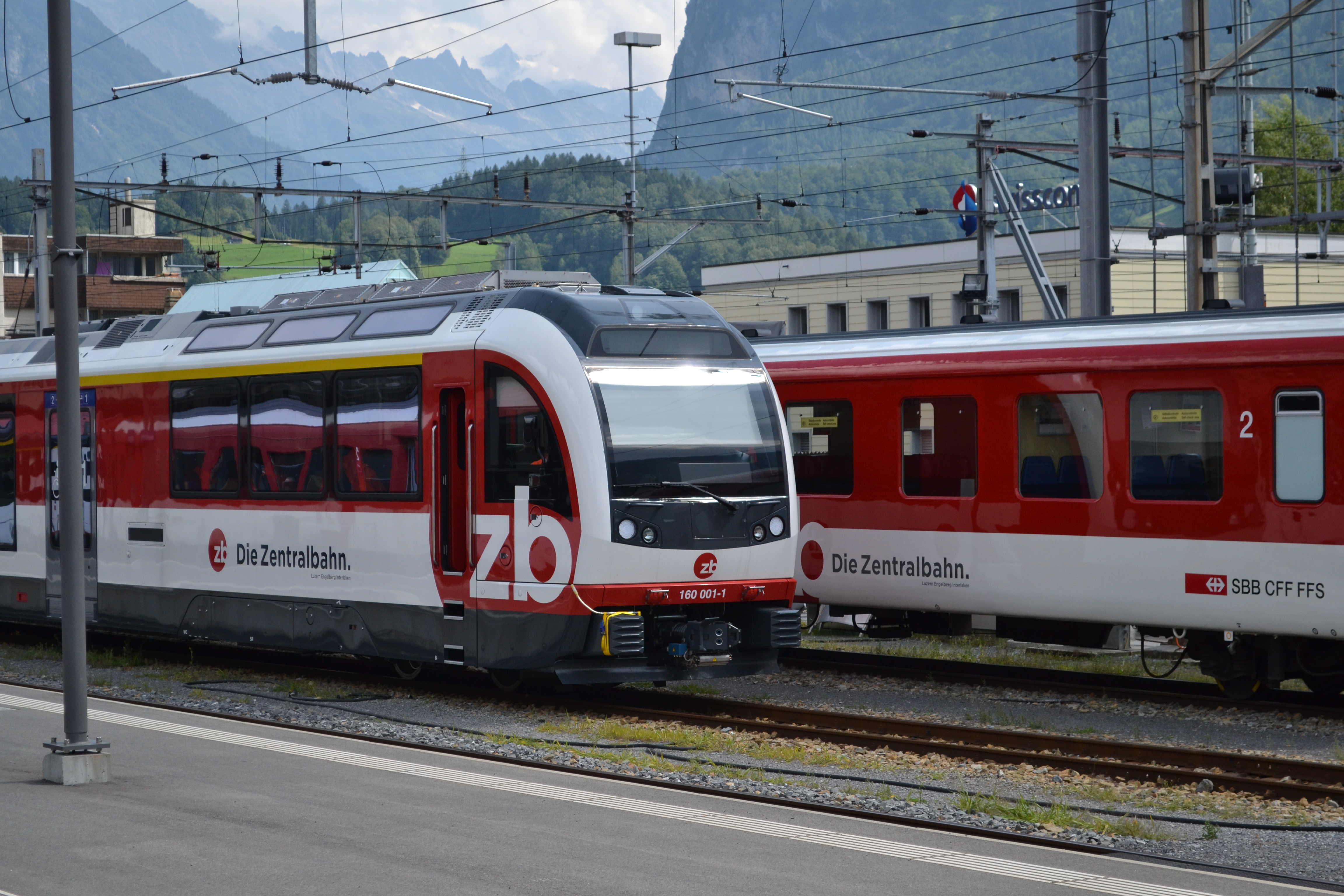 Zentralbahn ABeh 160 treinstel, van het type Stadler FINK, te Meiringen.